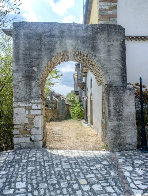 Dettagli di Sant'Arcengelo Trimonte (BN)